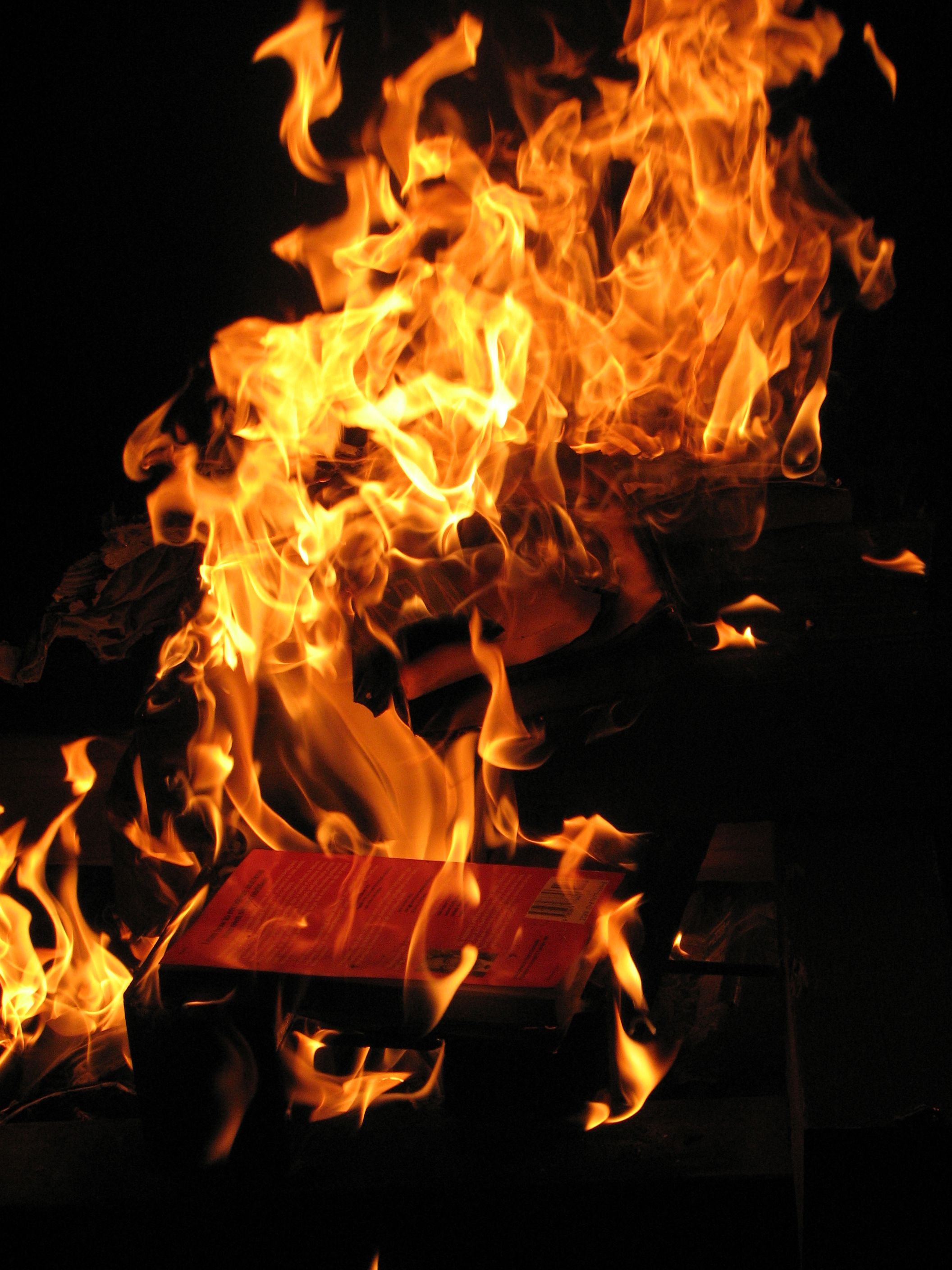 Book burning